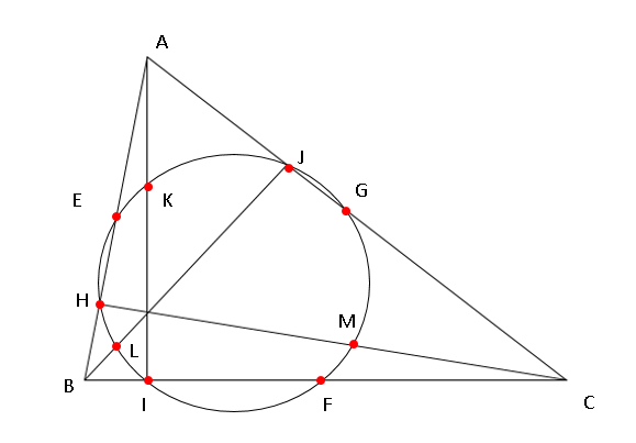 九点円の画像